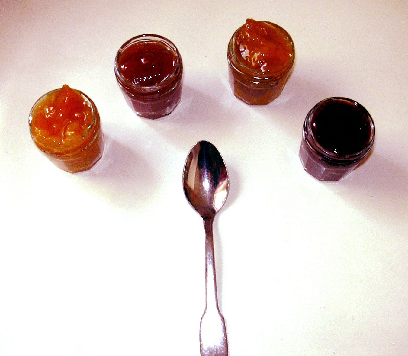 confitures allégées